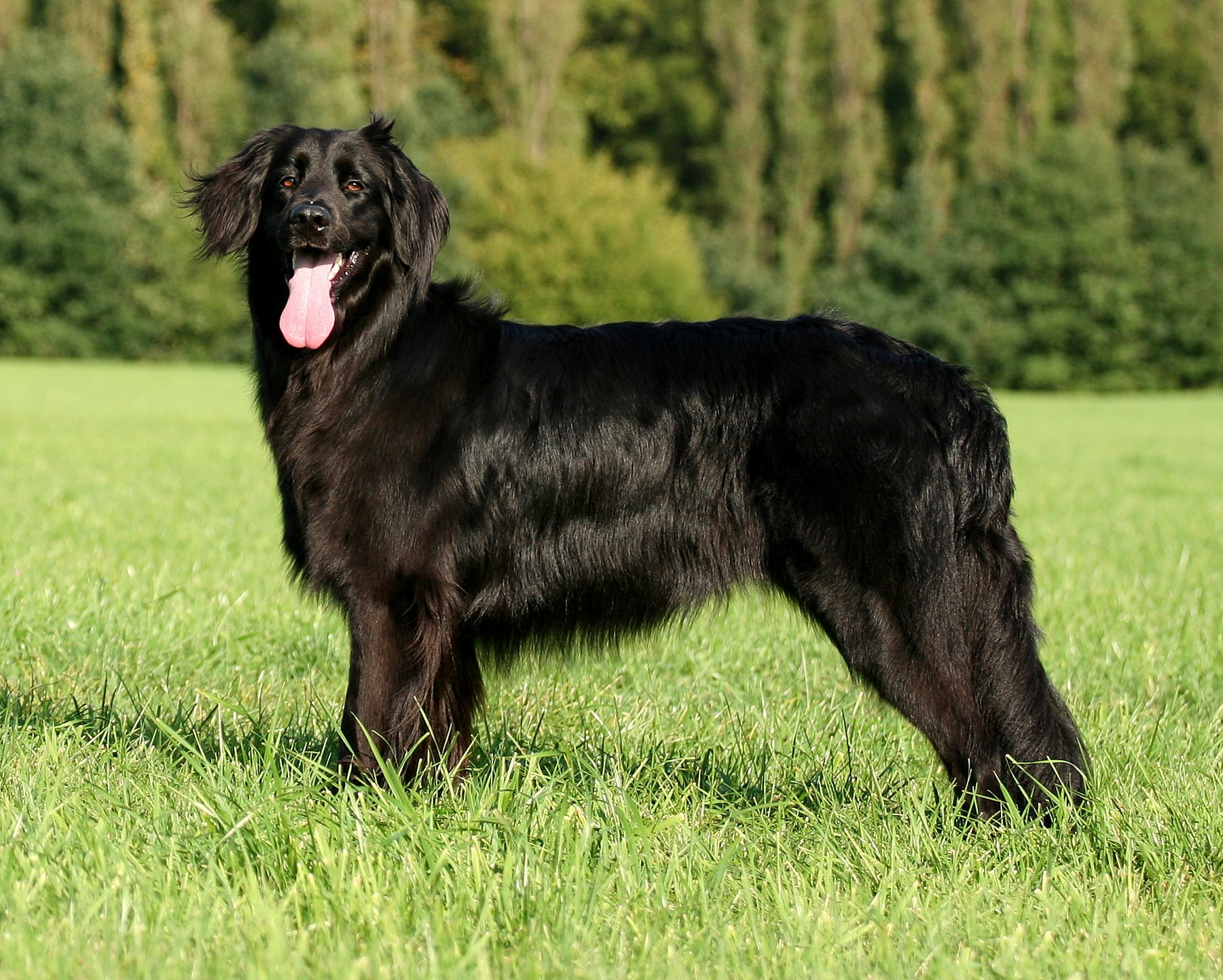 Hovawart-Hündin - Vita von den Hanseaten (HZD/FCI)